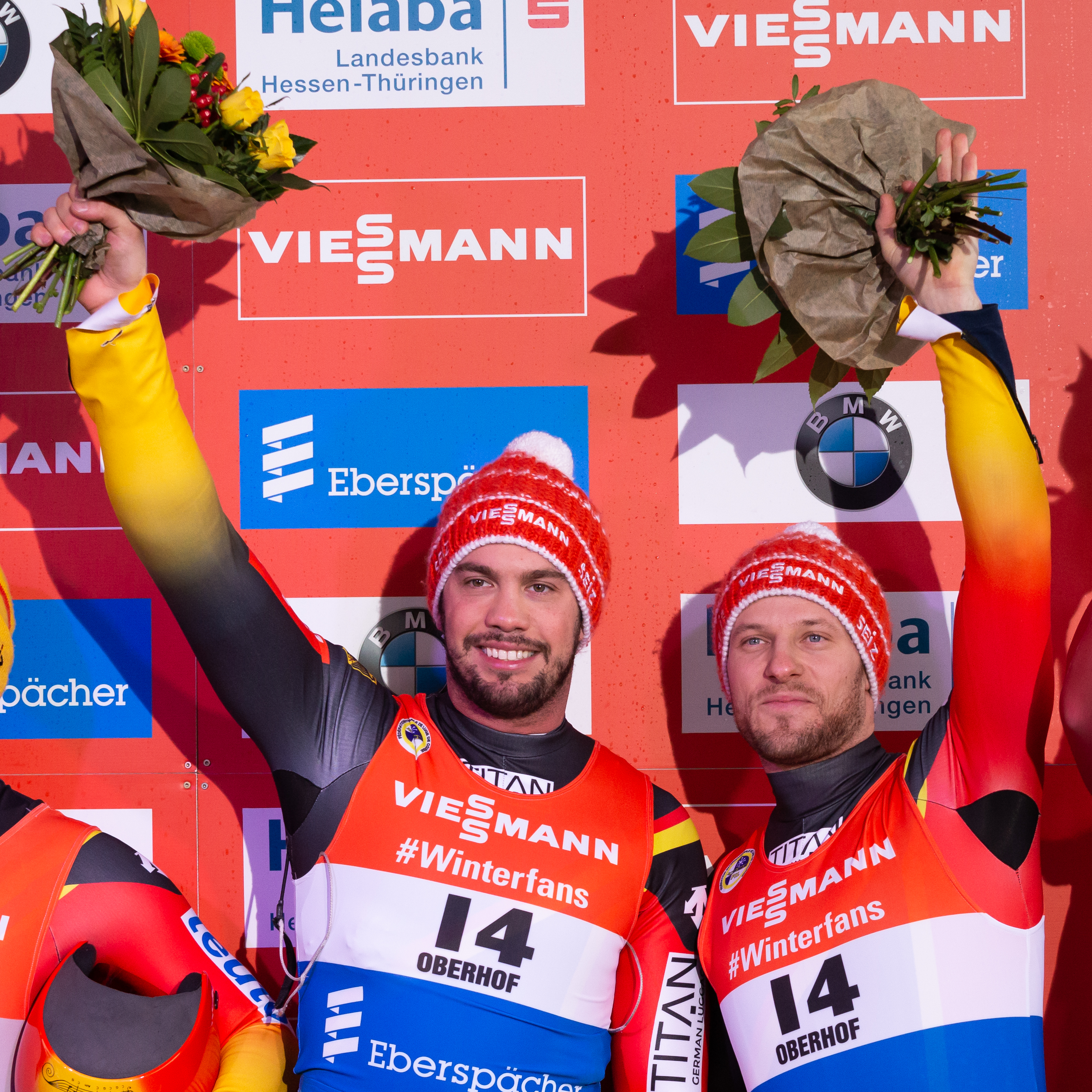 Viessmann Luge World Cup Oberhof; Gewinner des Doppelsitzer-Rennens v.li.: Tobias Wendl (GER, Deutschland), Tobias Arlt (GER, Deutschland); Sieger, Erstplatzierter, Goldmedaille, gold medal; Flower Ceremony, Blumenzeremonie, Siegerehrung; Jubel, celebration